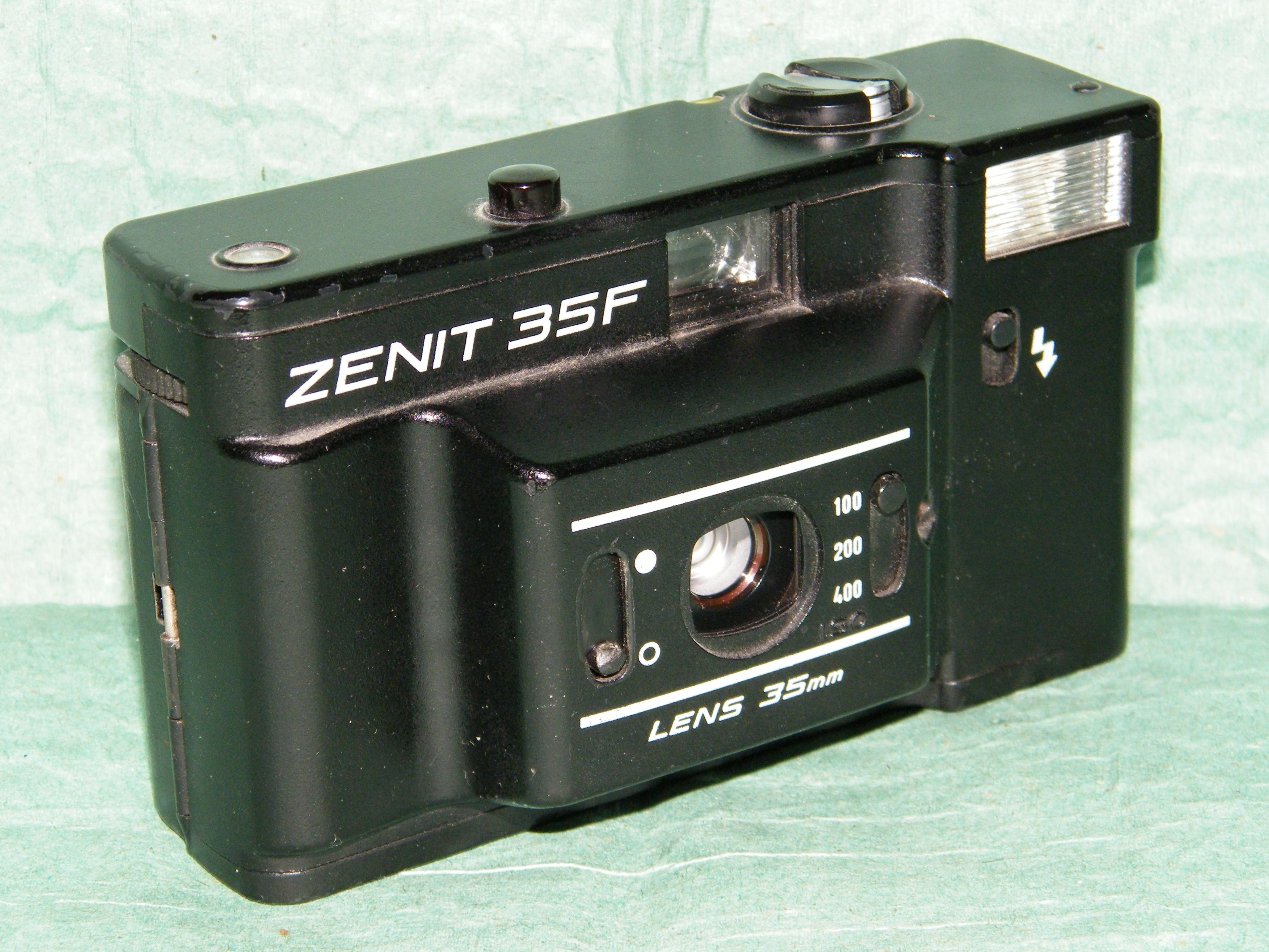 Фотоаппарат Зенит-35Ф разработан и производился на ЛОМО